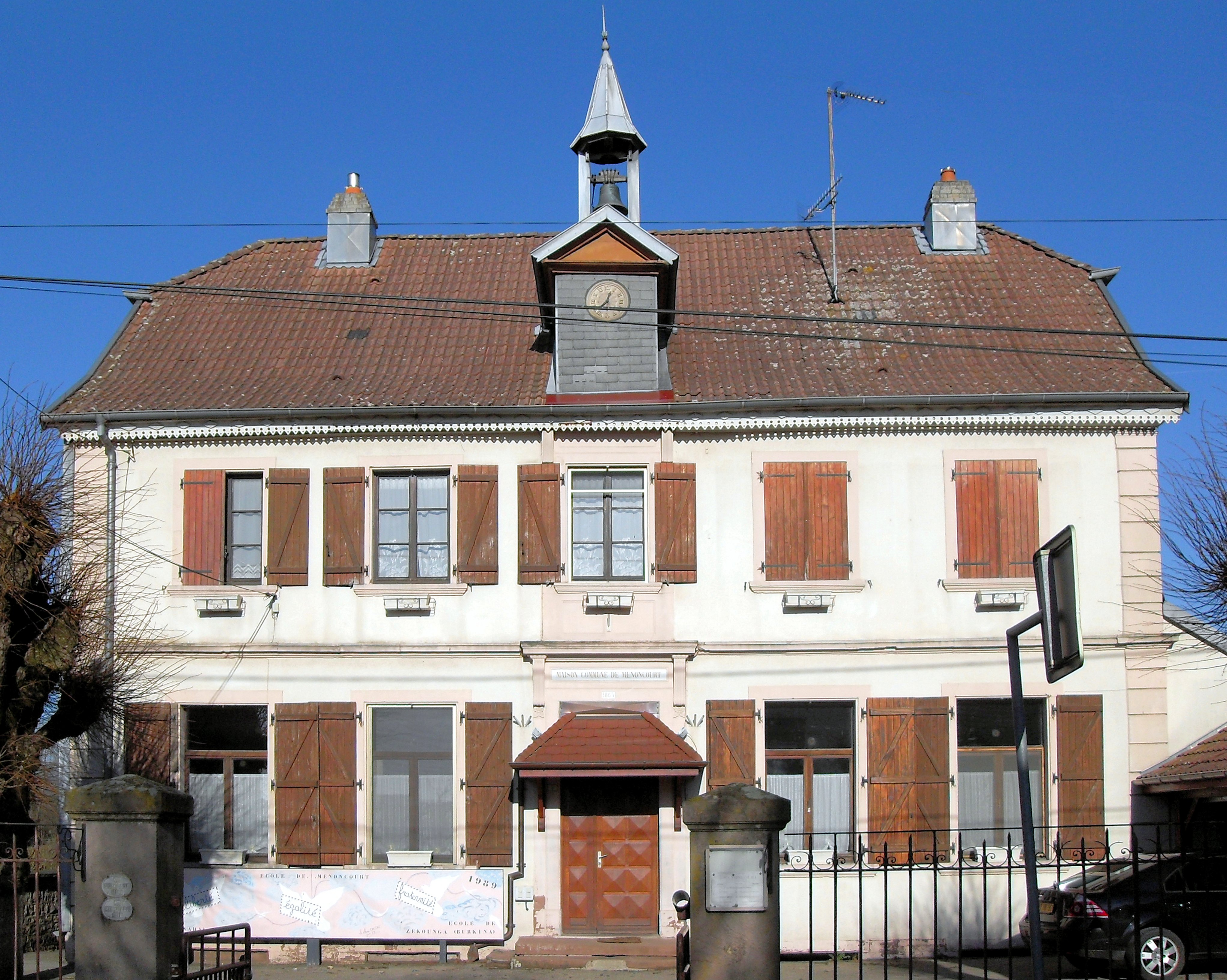 La mairie de Menoncourt